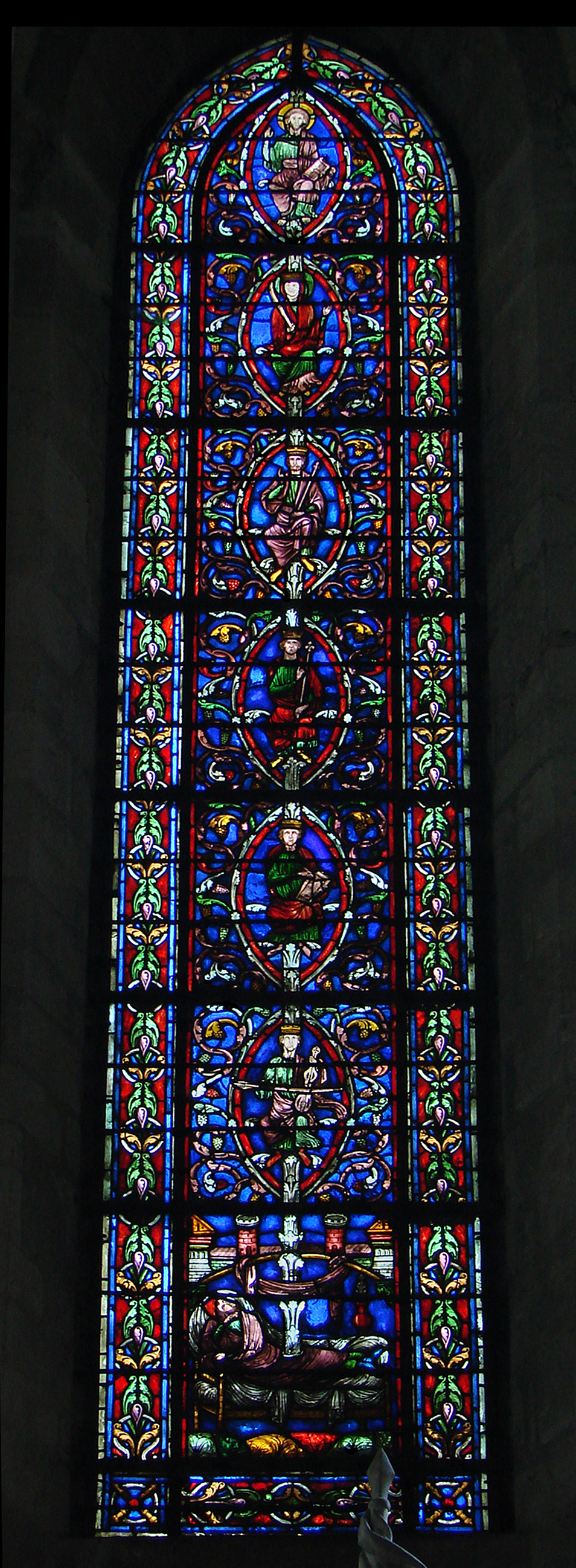 Vitrail de la cathédrale Saint-Pierre-et-Saint-Paul de Troyes: l'Arbre de Jessé, 13ème siècle avec des parties restaurées au 19ème siècle.